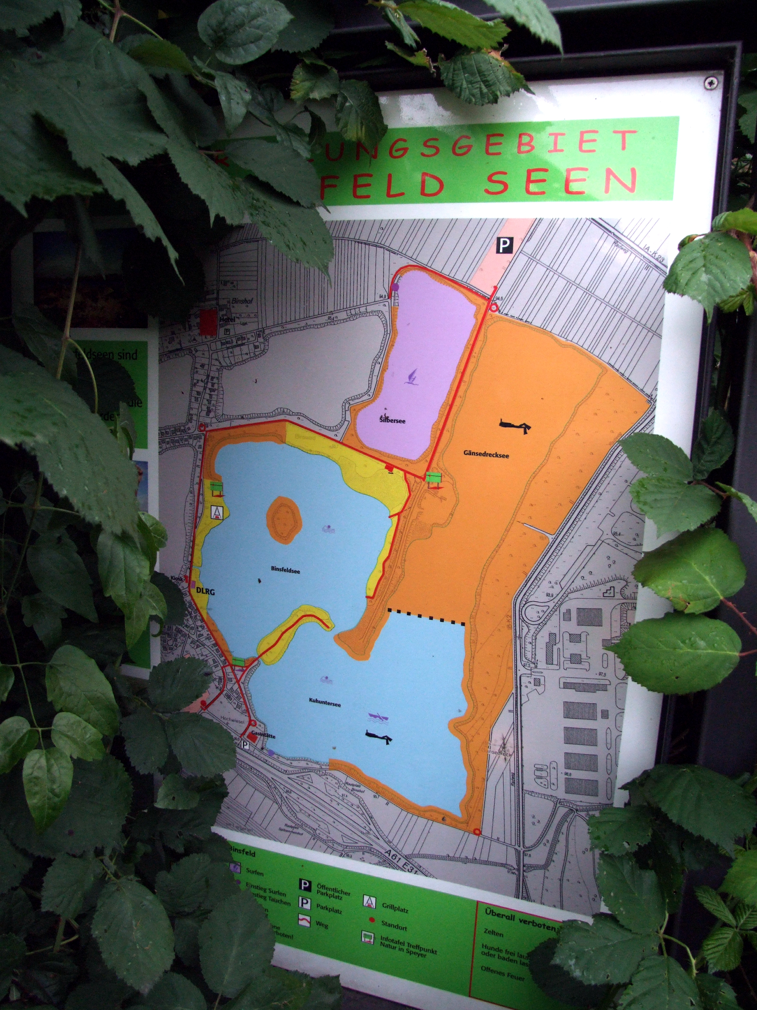 Kartenschild mit Verdeutlichung der Nutzungsregeln für Silbersee, Binsfeld, Gänsedrecksee und Kuhunter